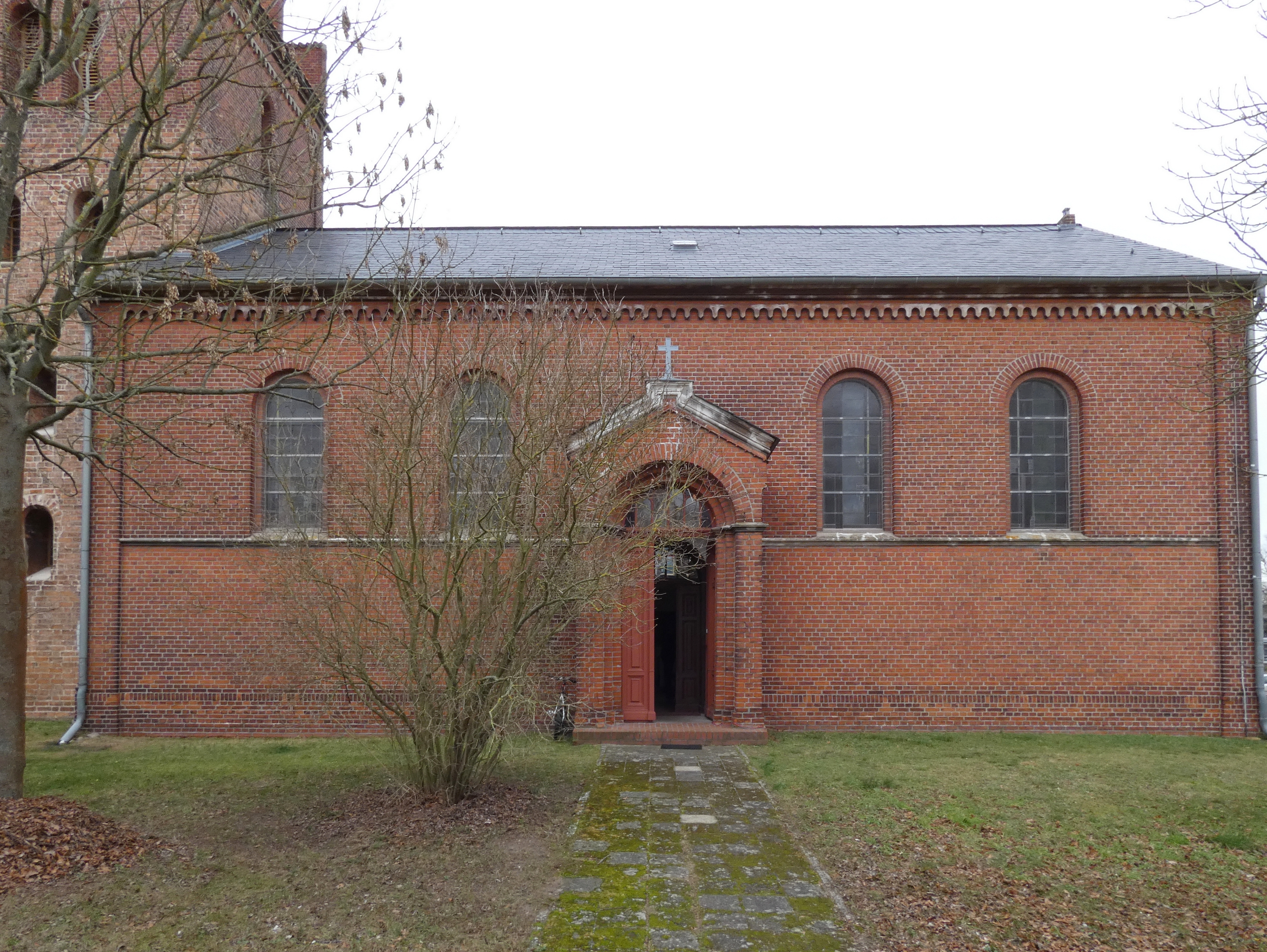 Dorfkirche Klein Kreutz Südseite